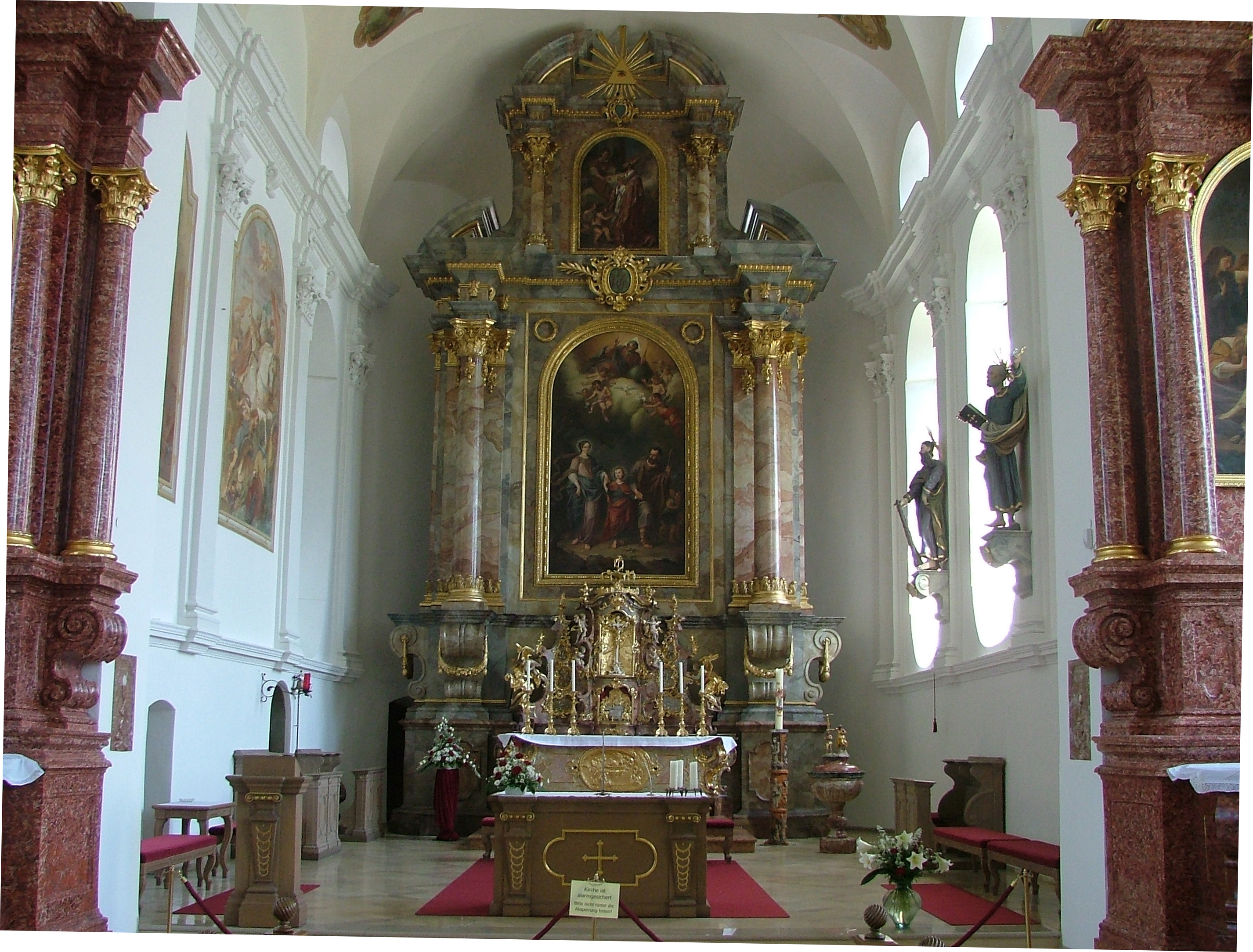 Wertach, Kirche, Hochaltar mit "Flucht nach Ägypten" (bzw. "Heiliger Wandel"?) von Johann Kaspar Sing